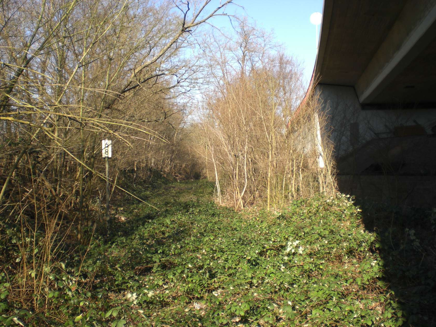 Abzweig der Bliestalbahn zur Schwarzbachtalbahn, Streckenkilometer 6,8